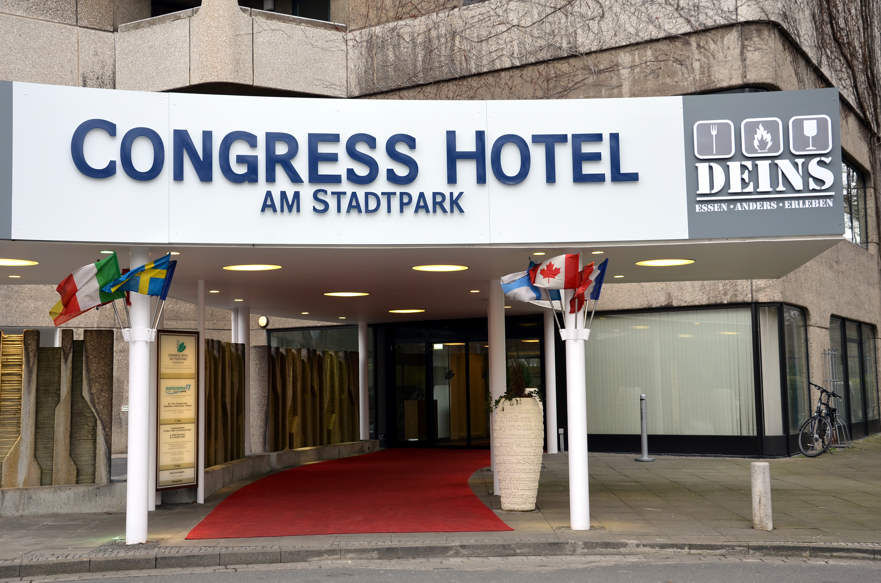 Eindrücke vom Congress Hotel am Stadtpark am Tag des Empfang des Freundeskreis Hannover durch den General Manager des Hauses, Cord Kelle ...